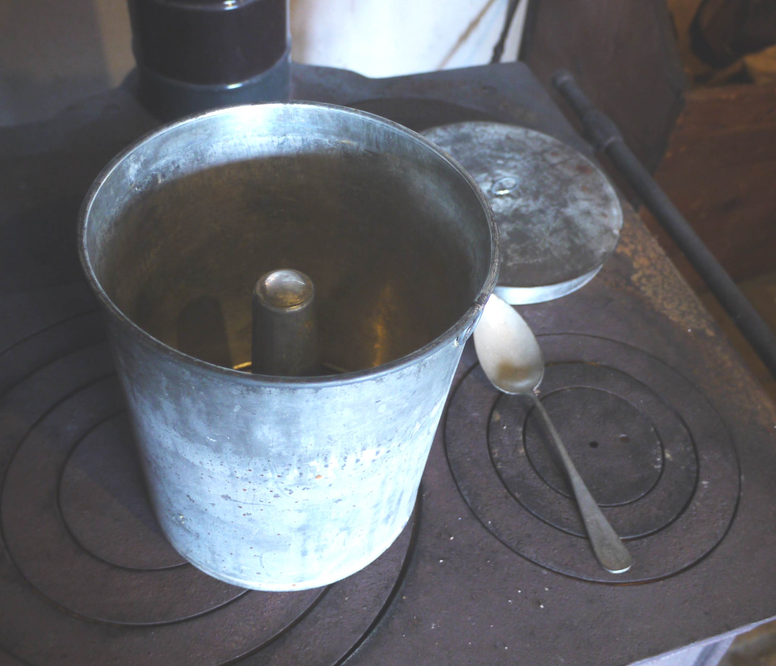 moule (rabolire) à farcement, m'appartenant